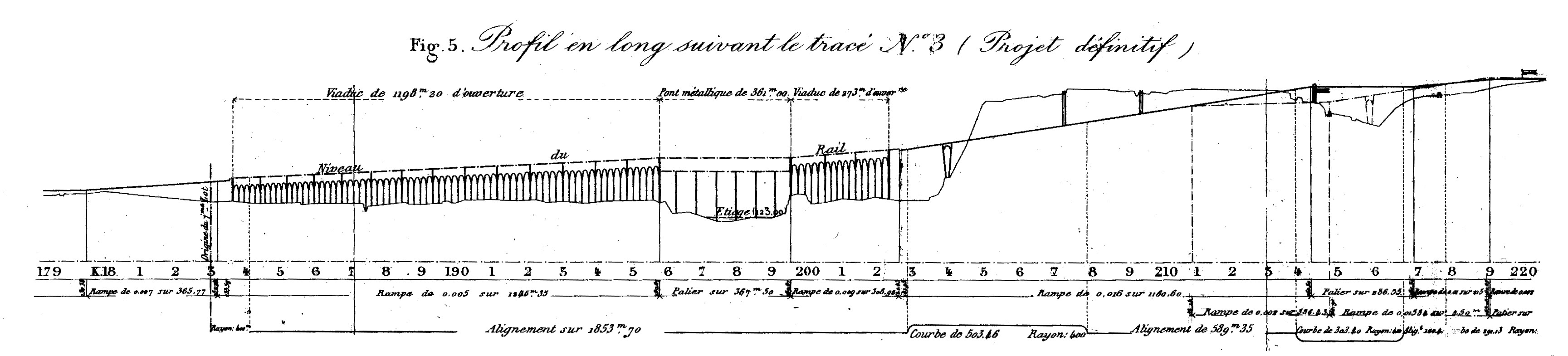 Viaduc ferroviaire de Gien – Commune de Gien – Département du Loiret – France – Construit en 1893 - Profil en long général.